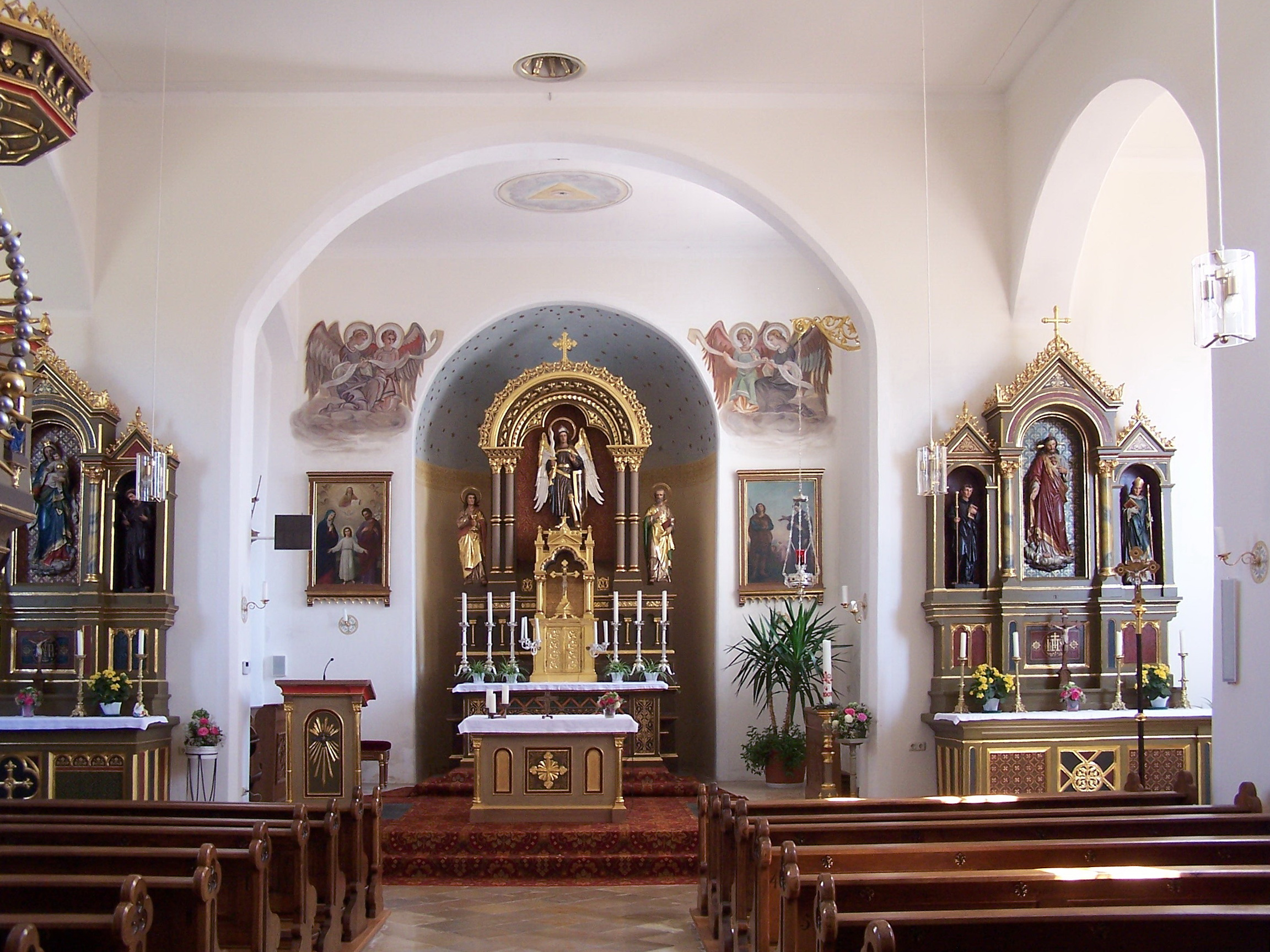 Furth in Niederbayern, Schatzhofen Nr. 14. Pfarrkirche St. Michael. Saalkirche mit Chorturm, Chor romanisch, 12. Jahrhundert, Langhaus 1687/88 von Victor Thoni, mit Lisenen- und Putzgliederung. Der Innenraum ist flach gedeckt. Die Apsis ist halbkreisförmig und gewölbt. Drei neuromanische Altäre.